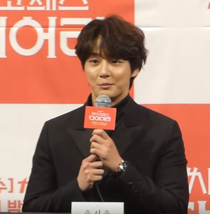 13일 오후 서울시 강남구 논현동 임피리얼 팰리스 서울에서 tvN 새 수목드라마 '싸이코패스 다이어리’ 제작발표회가 열려 배우 윤시윤, 정인선, 박성훈이 참석해 작품소개 와 배역 소개를 하고 있다.